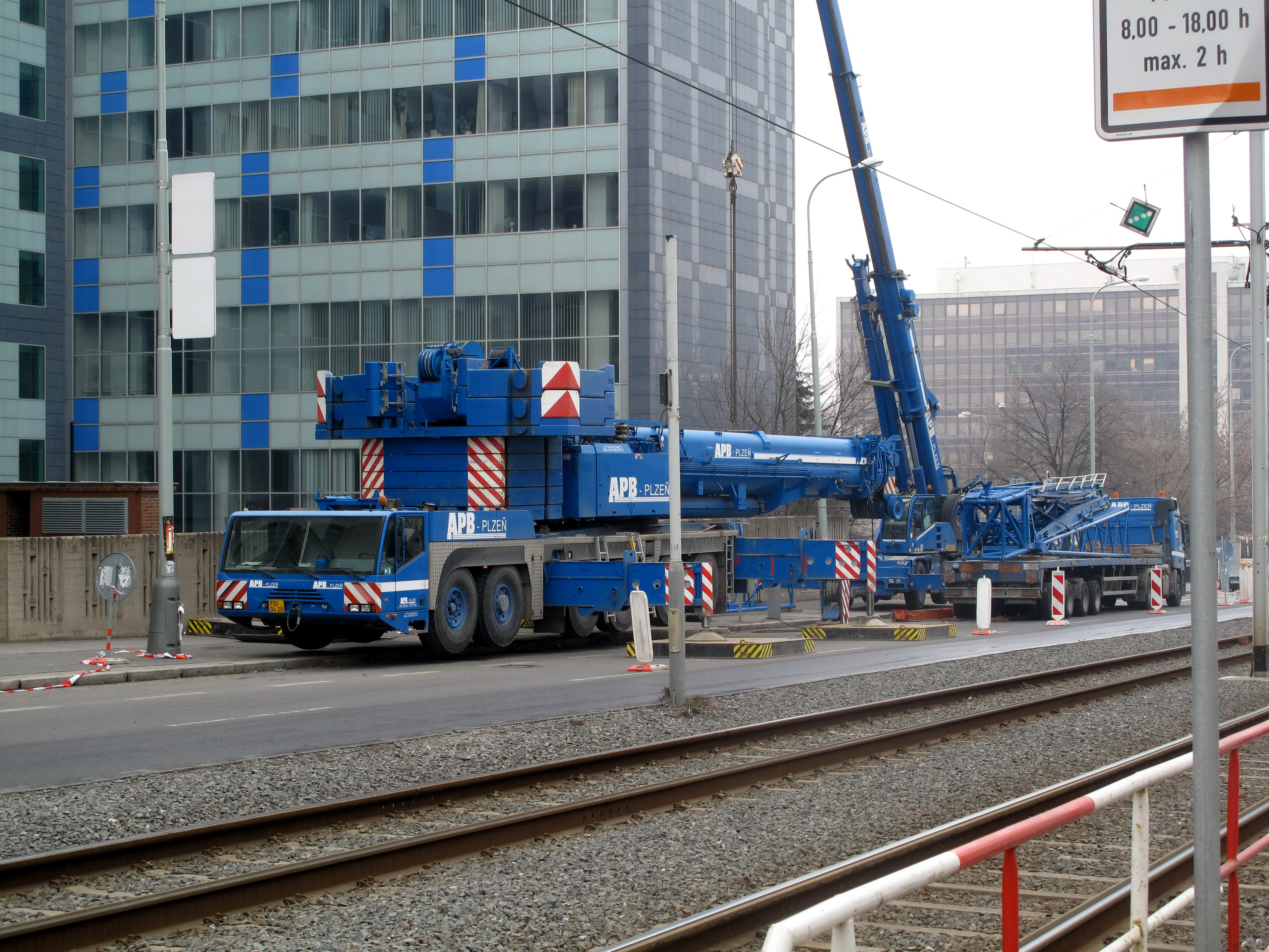 Olšanská, vozidlo